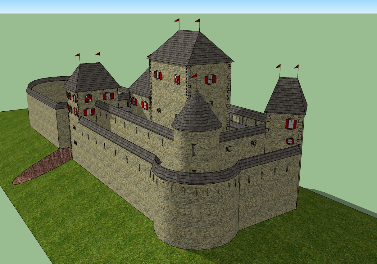 Grad Radeče (poskus rekonstrukcije)